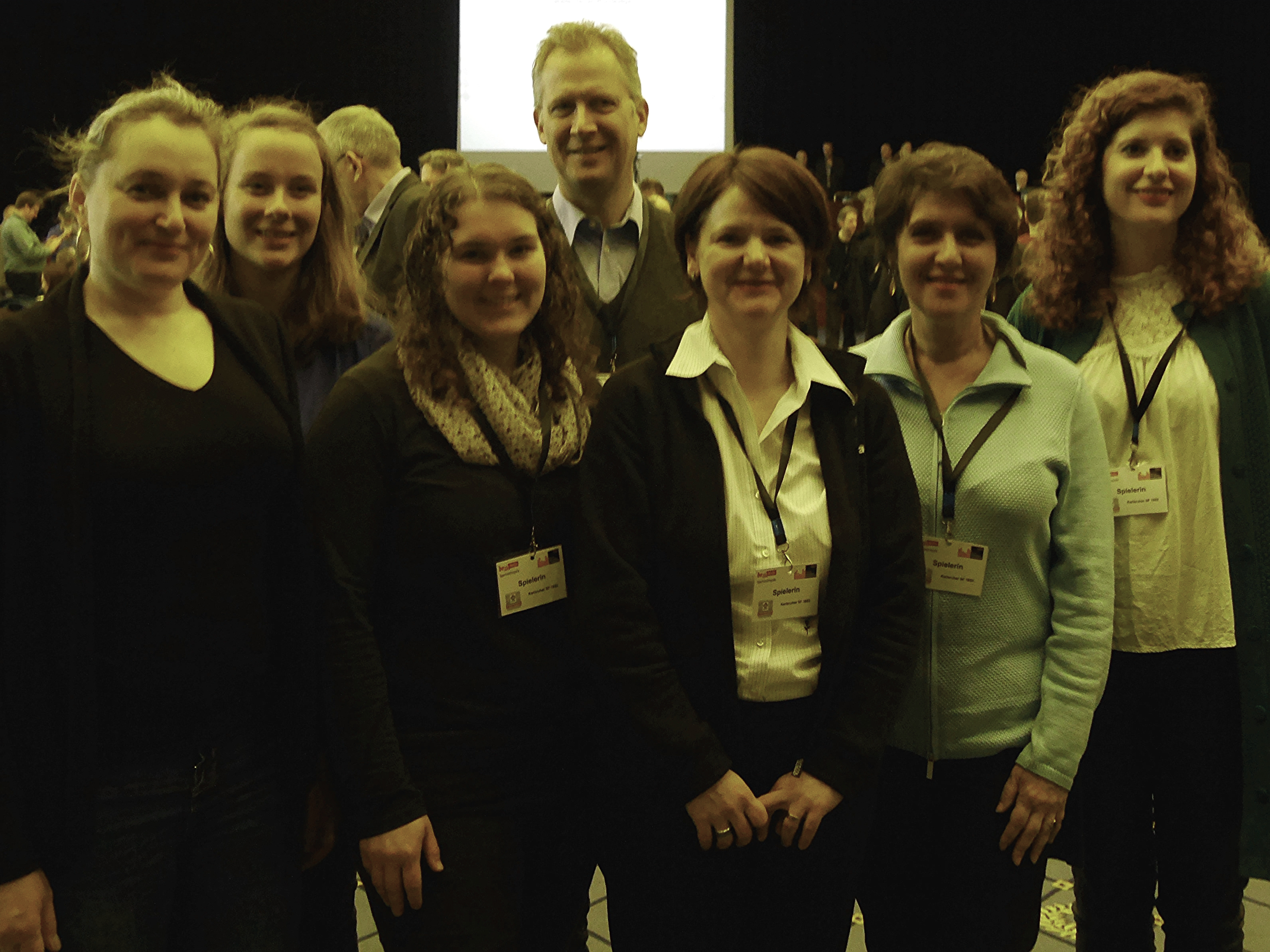 Das Frauenteam (mit Betreuer Christoph Pfrommer) der Karlsruher Schachfreunde, Finalrunden der deutschen Schachbundesliga 2017 in Berlin. Von links nach rechts: Inna Gaponenko, Sarah Hund, Manuela Mader, Gundula Heinatz, Julia Scheynin und Jovanka Houska.